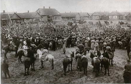 Беларуская (тарашкевіца): Рэвалюцыйная маніфэстацыя ў Маладэчне